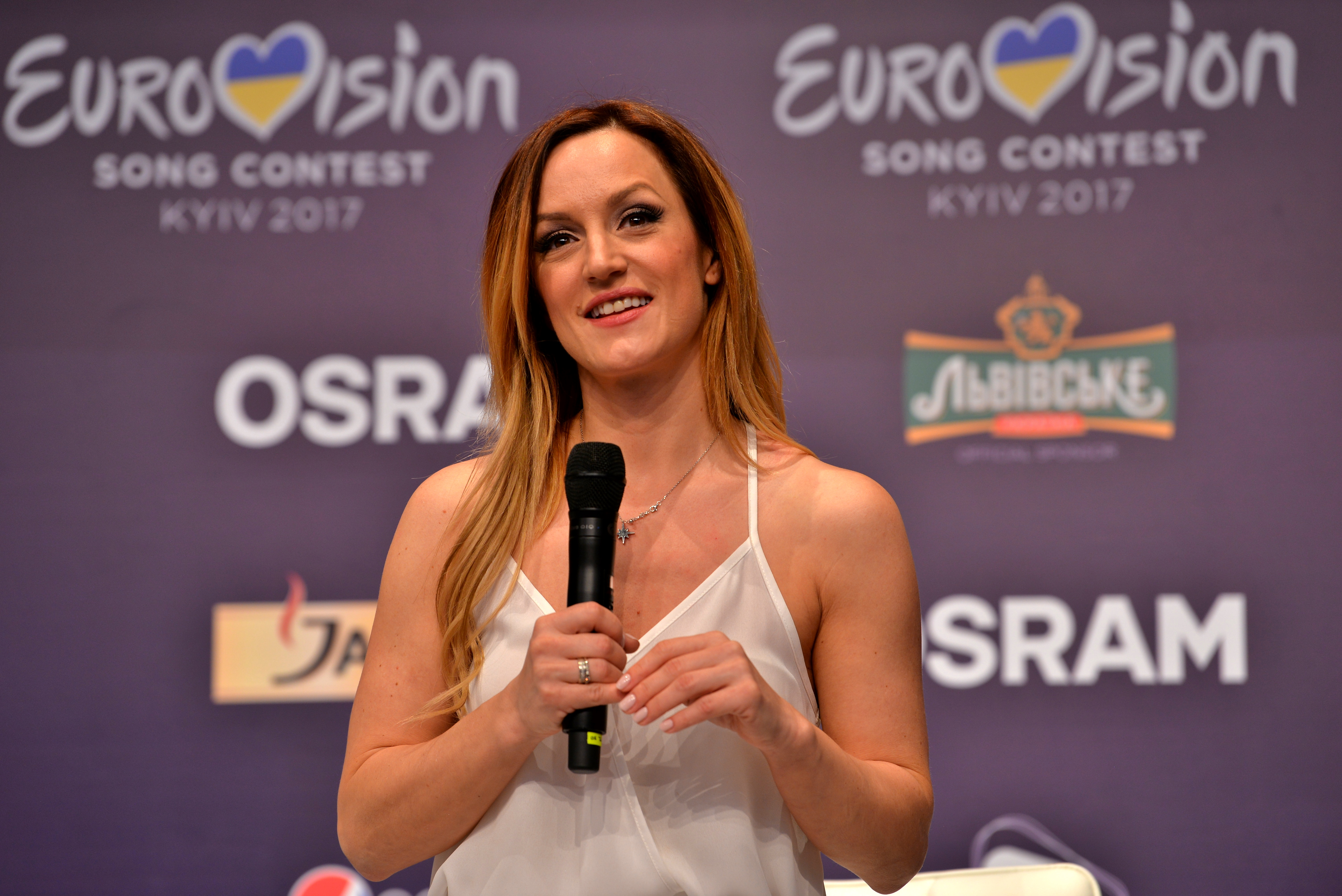 Учасниця пісенного конкурсу Євробачення 2017 від Сербії Тіяна Боґічевич на прес-конференції в Києві